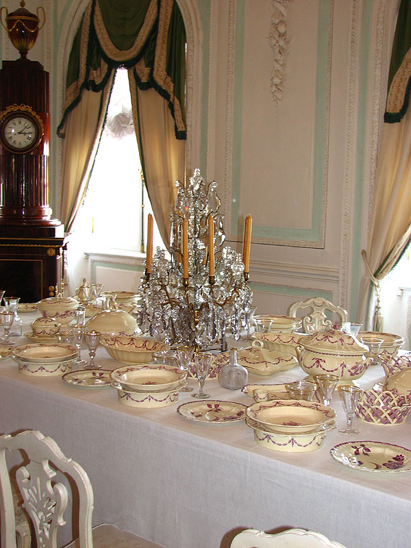 Столовая_1